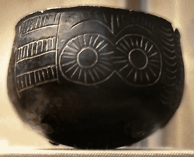 Cuenco con motivos oculados (yacimiento Los Millares (Santa Fe de Mondujar, Almería, España)